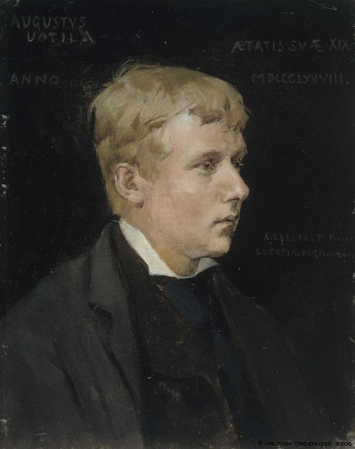 Aukusti Uotila. Porträtt av Albert Edelfelt. Studie för målningen Karl Fleming, 1878. 27x22cm. Olja på duk.